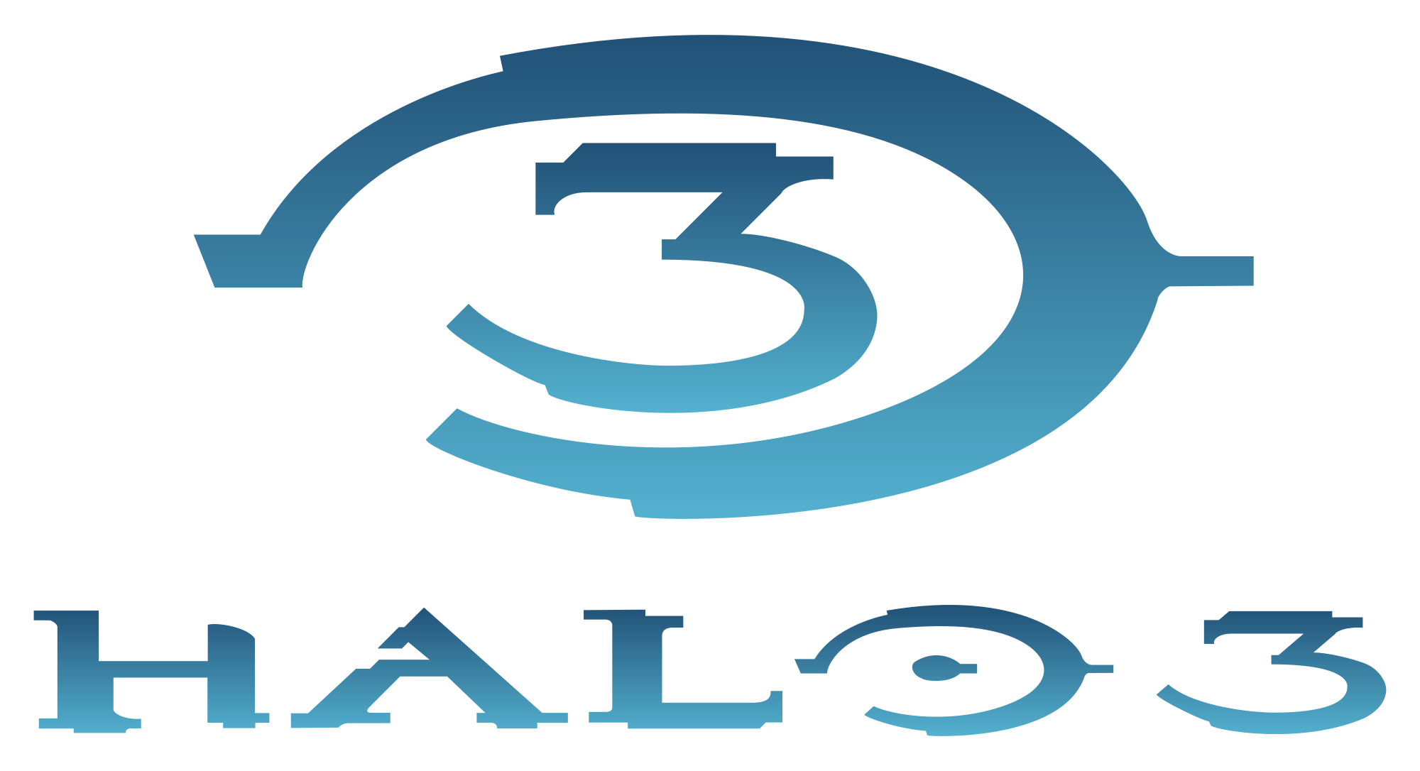 Halo 3 Logo